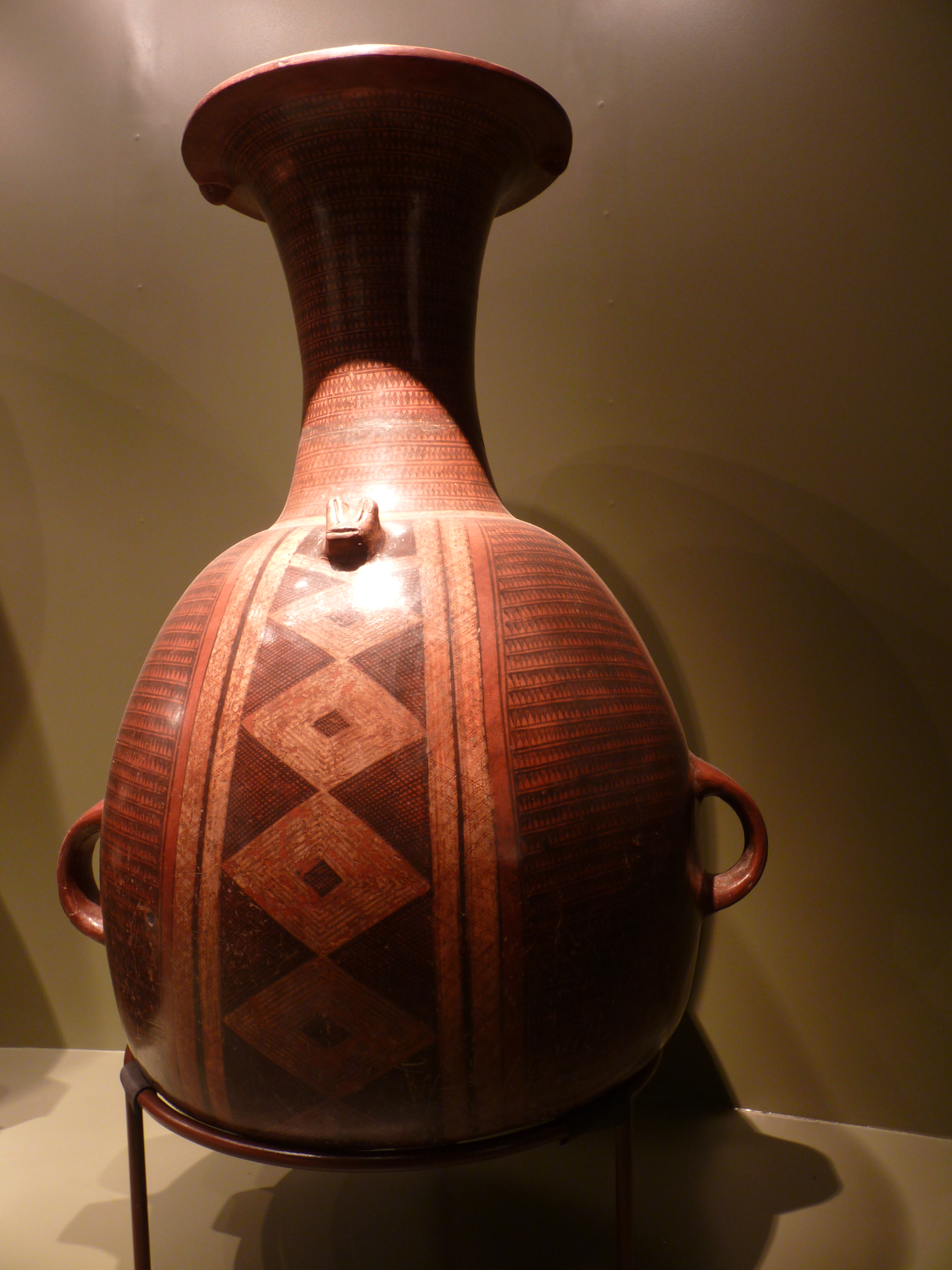 Museo de Arte Precolombino, Cusco